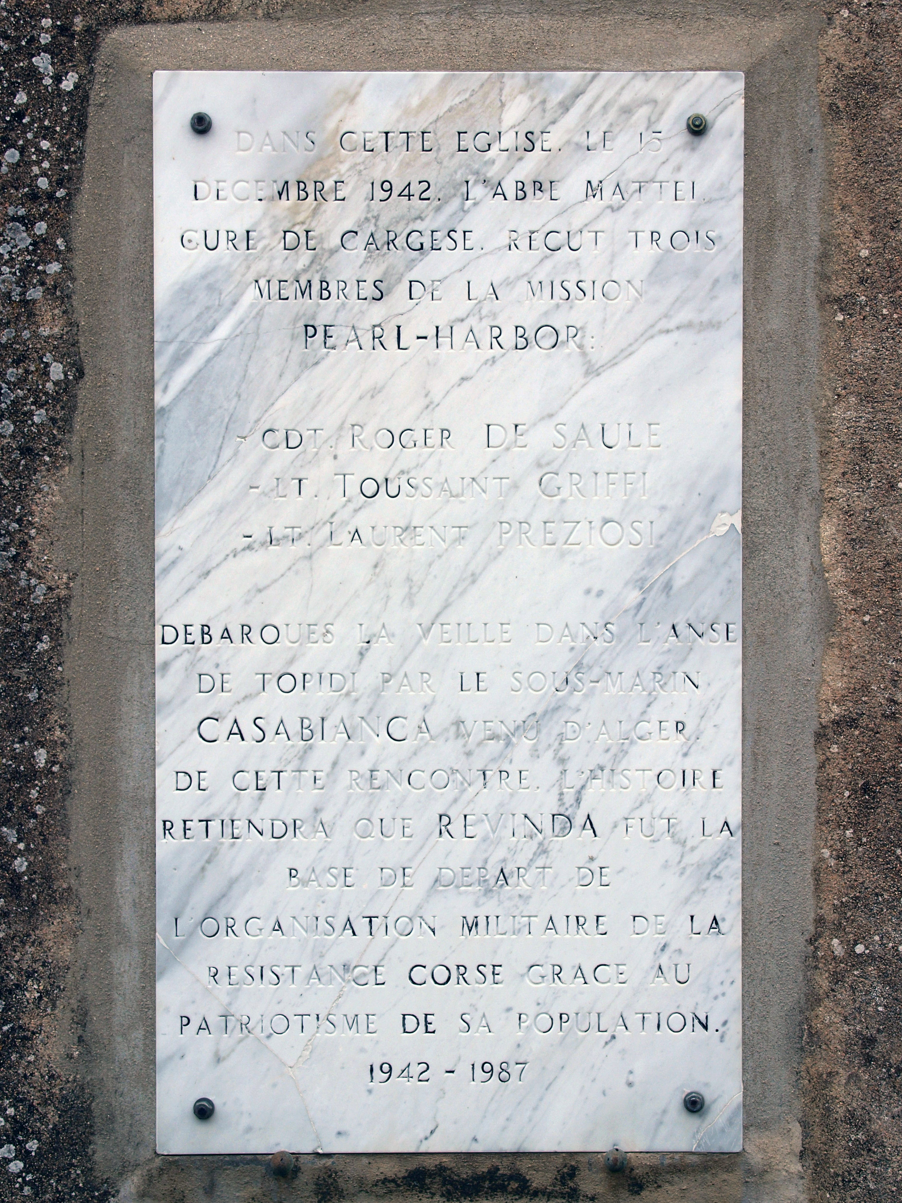 Marignana, Ouest Corse (Corse) - Plaque commémorative Mission Pearl Harbour sur la façade principale de l'église Saint-Siméon à Revinda